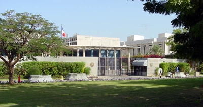 Ambassade de France à Mascate